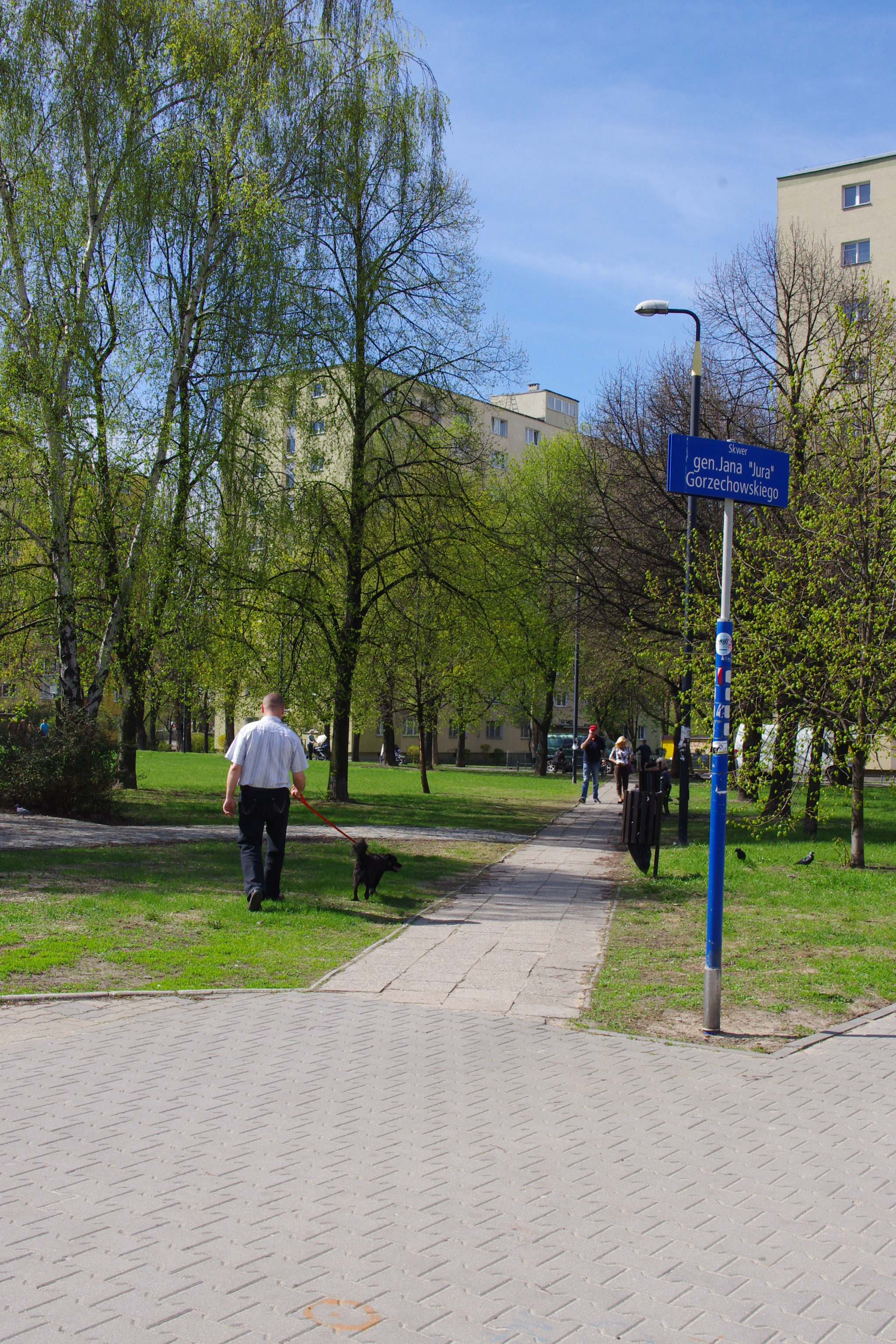 Skwer gen. Jana ”Jura”Gorzechowskiego na terenie warszawskiej Woli (osiedle Nowolipki)